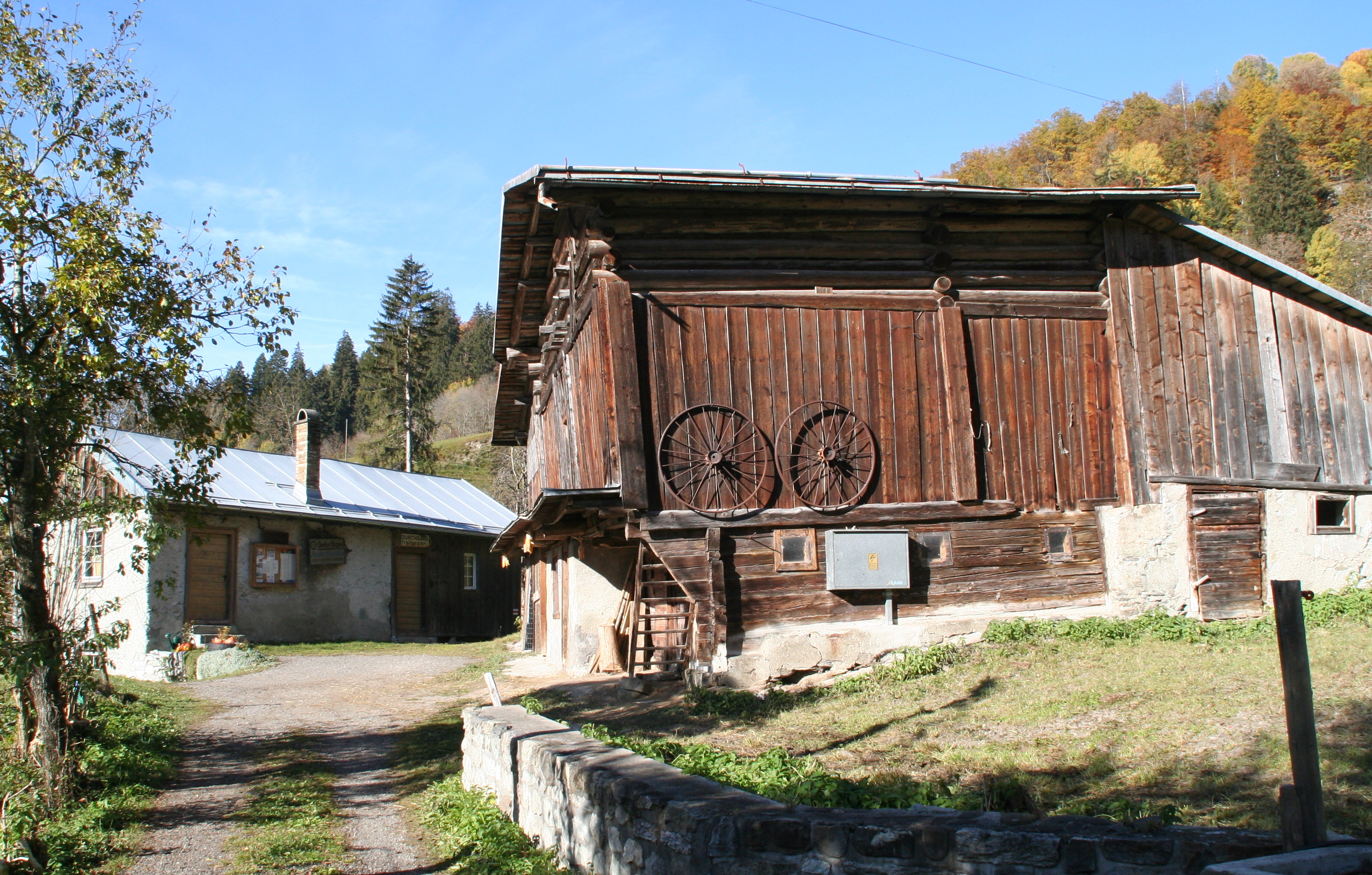 Historische Werkstätte Mulin Werkstätten Giger